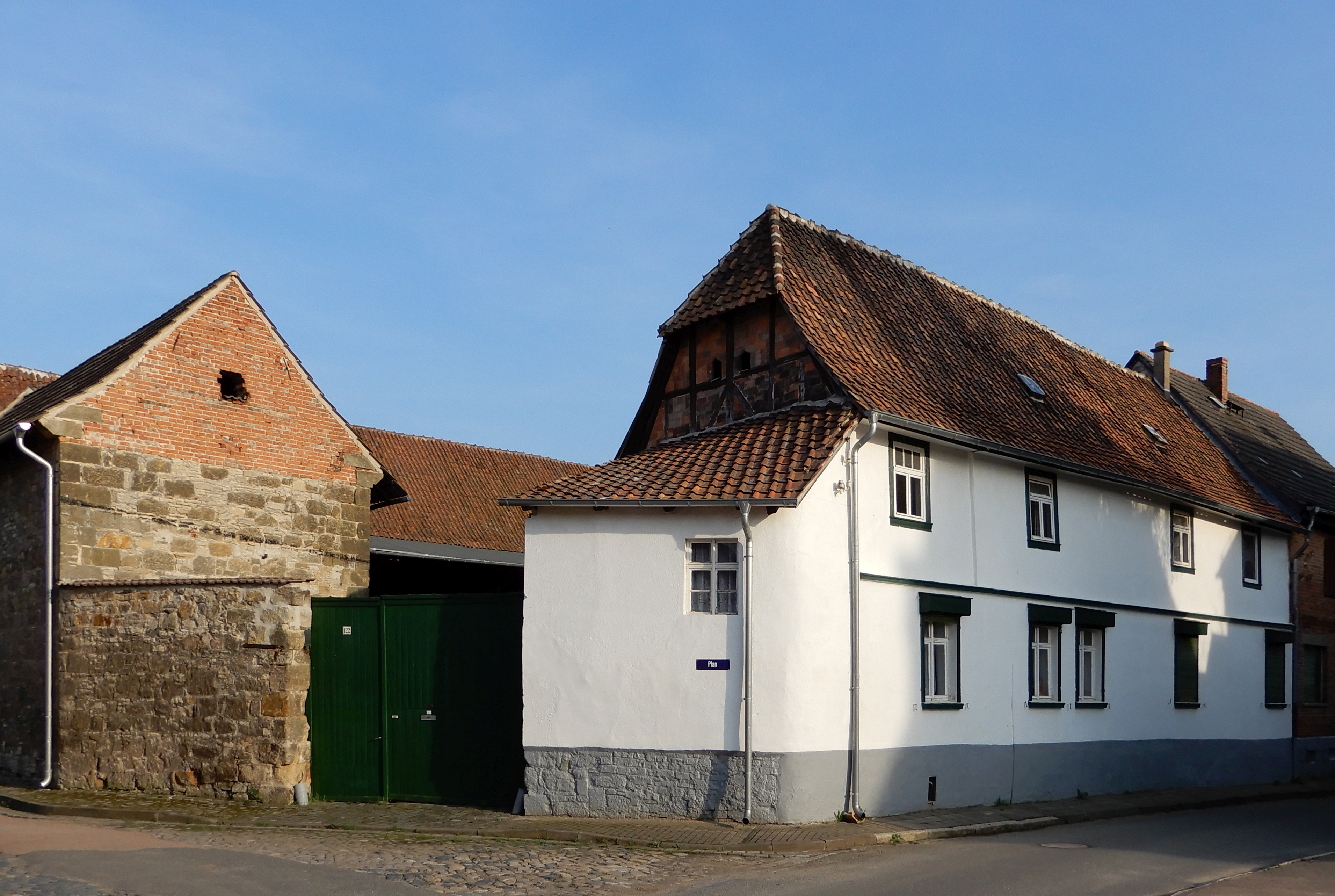 Gebäude in Badeborn, OT von Ballenstedt.